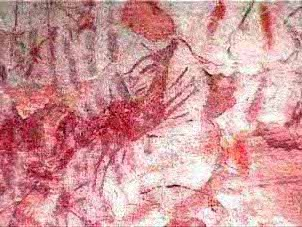 Arte rupestre en Henarejos, Cuenca.